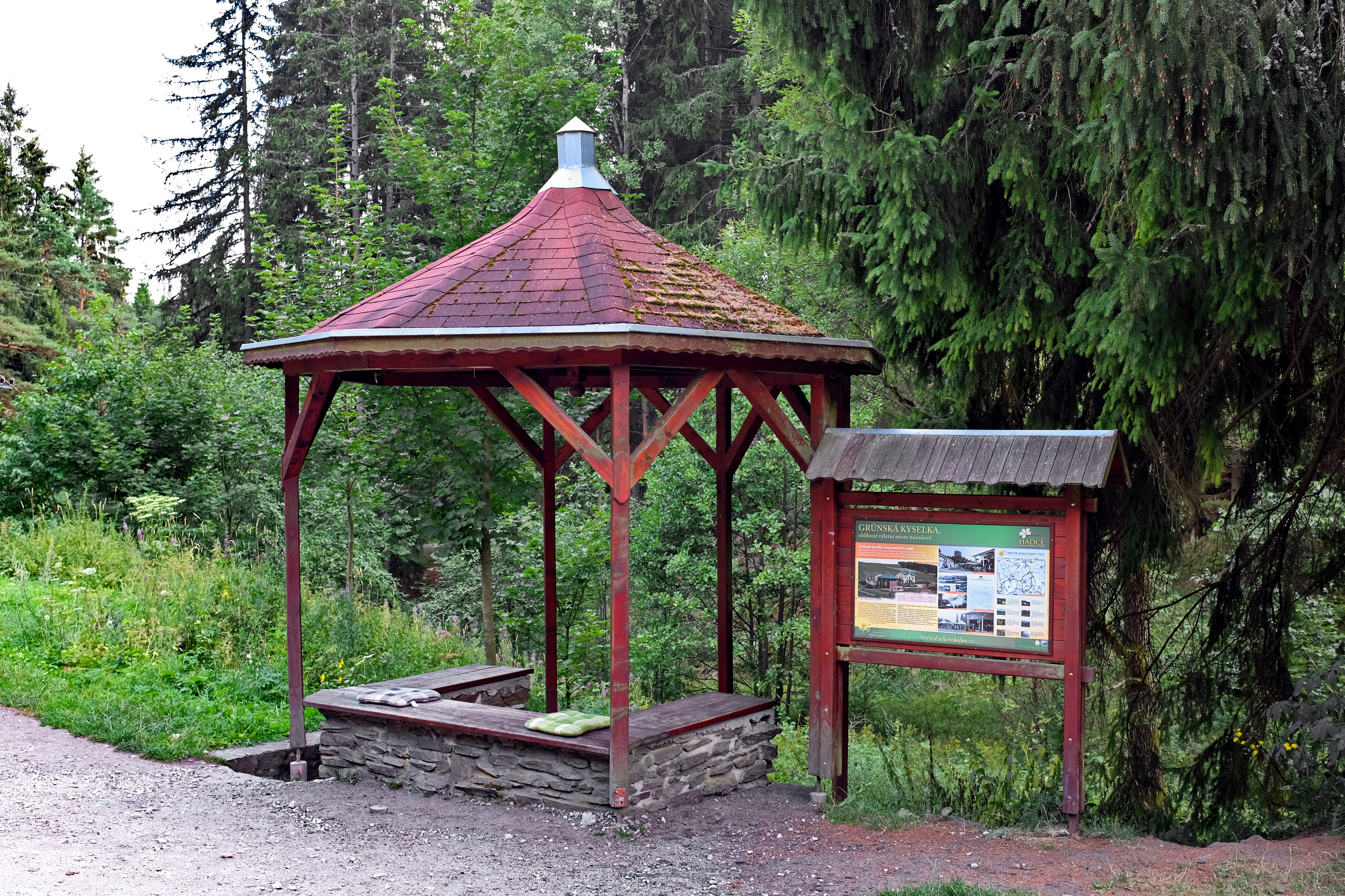 Grünská kyselka, Slavkovský les, okres Sokolov